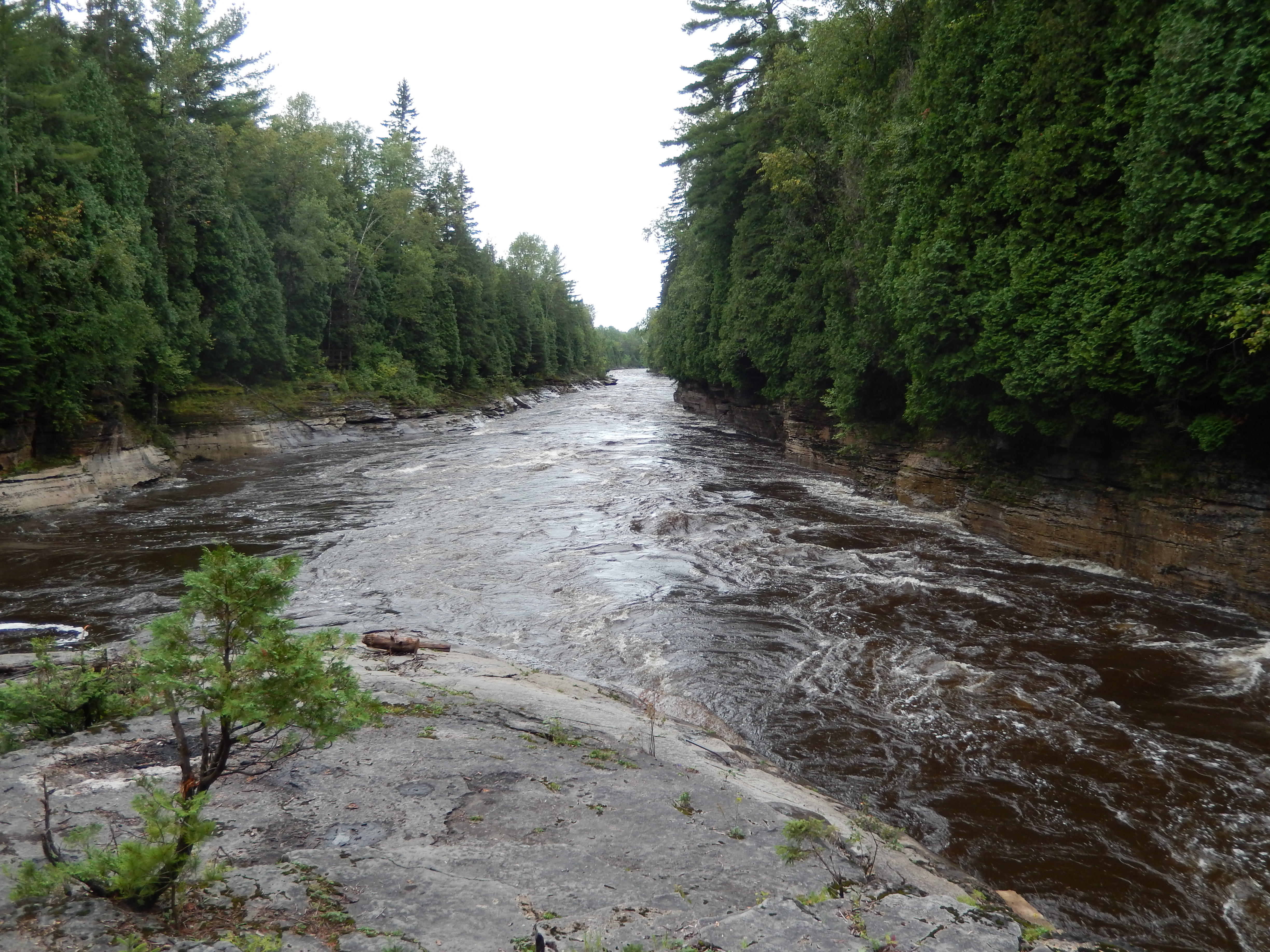 Rivière Sainte-Anne à Saint-Alban en août 2015